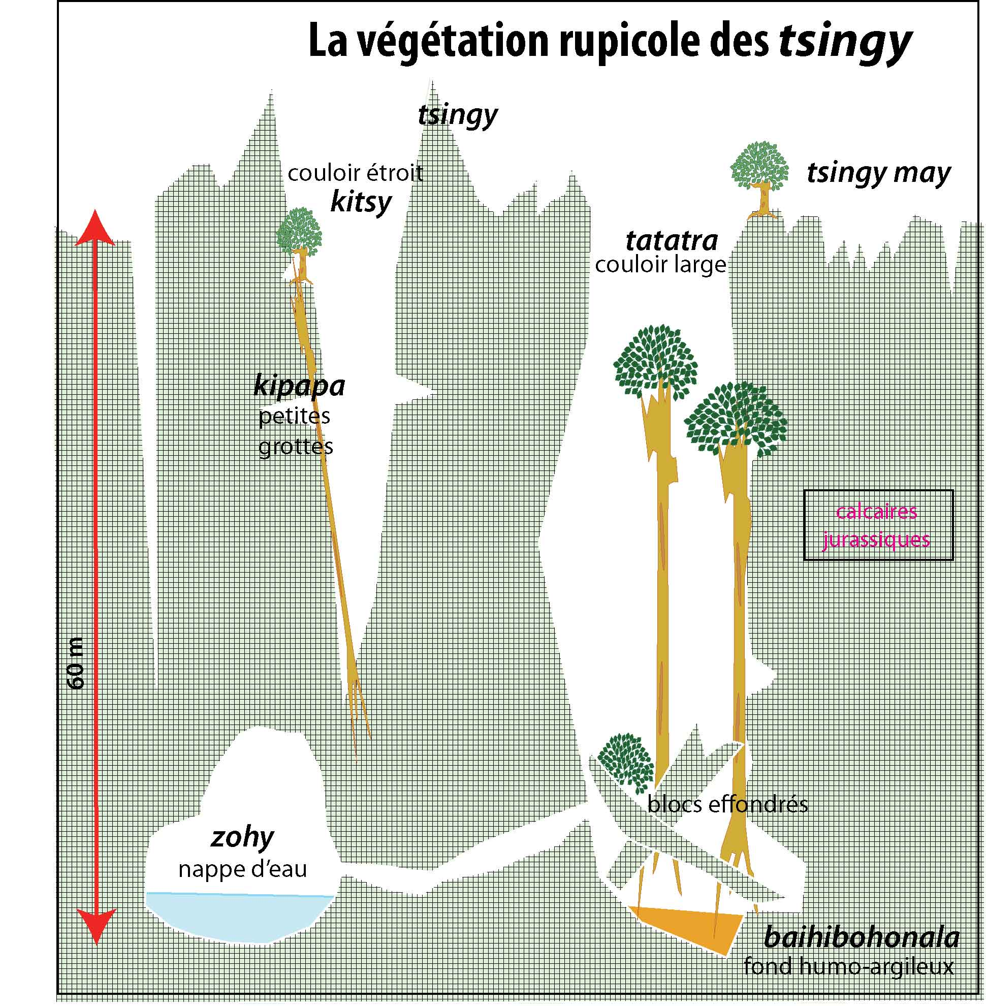 La végétation rupicole d'un tsingy de l'Antsingy du Bemaraha à Madagascar